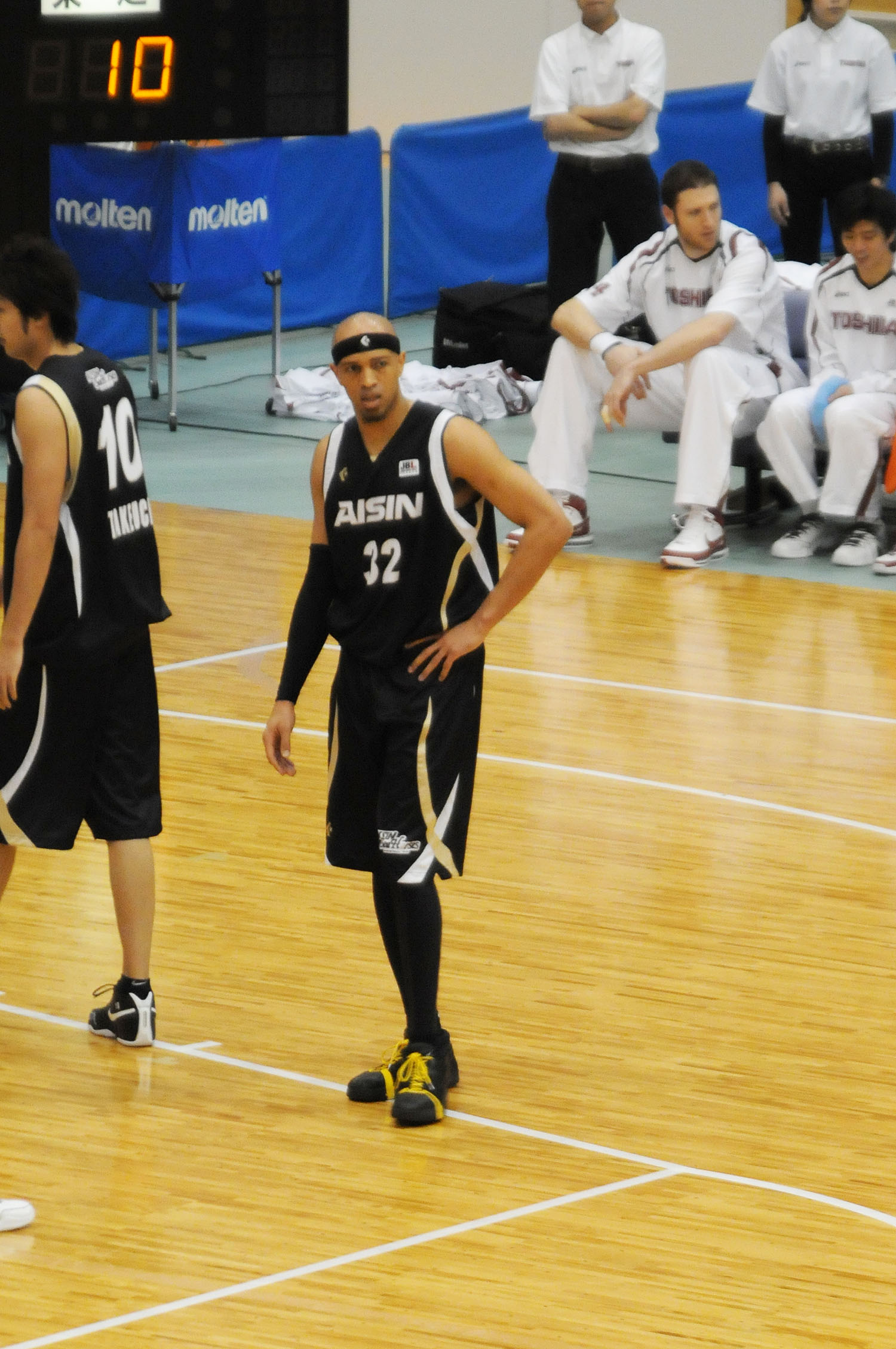 アイシンシーホースの桜木ジェイアール選手。琴丘総合体育館で。